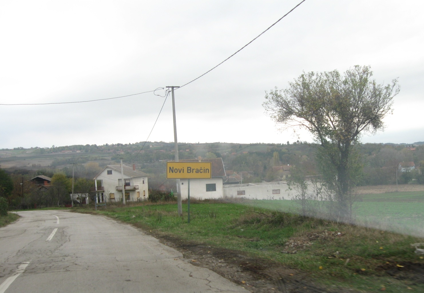 Нови Брачин (Ражањ)